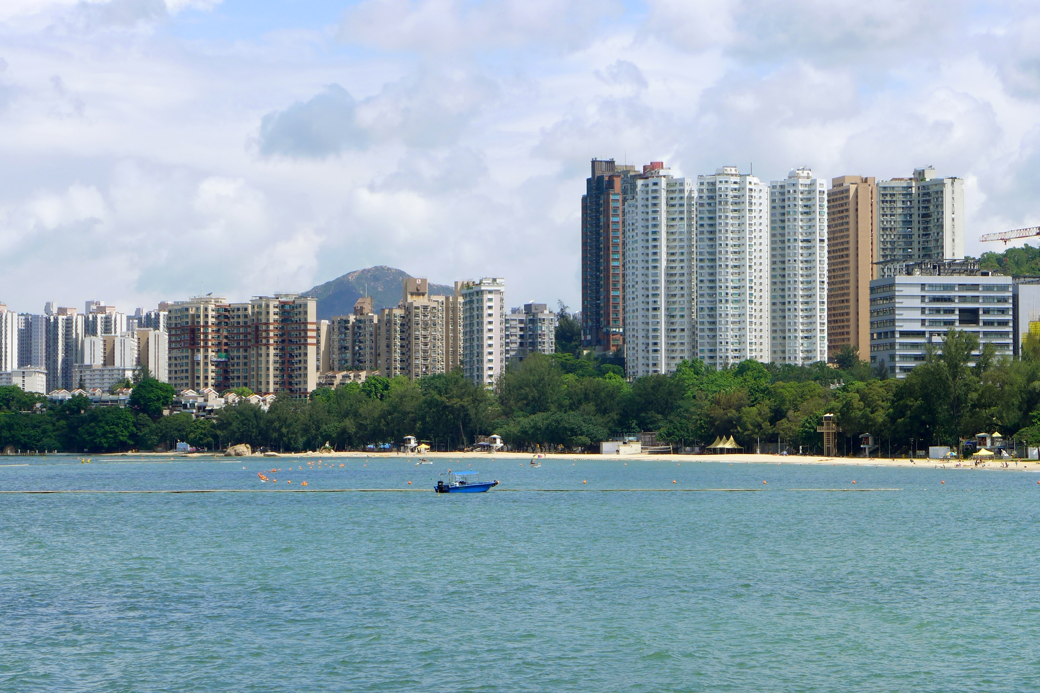 Sam Shing Hui